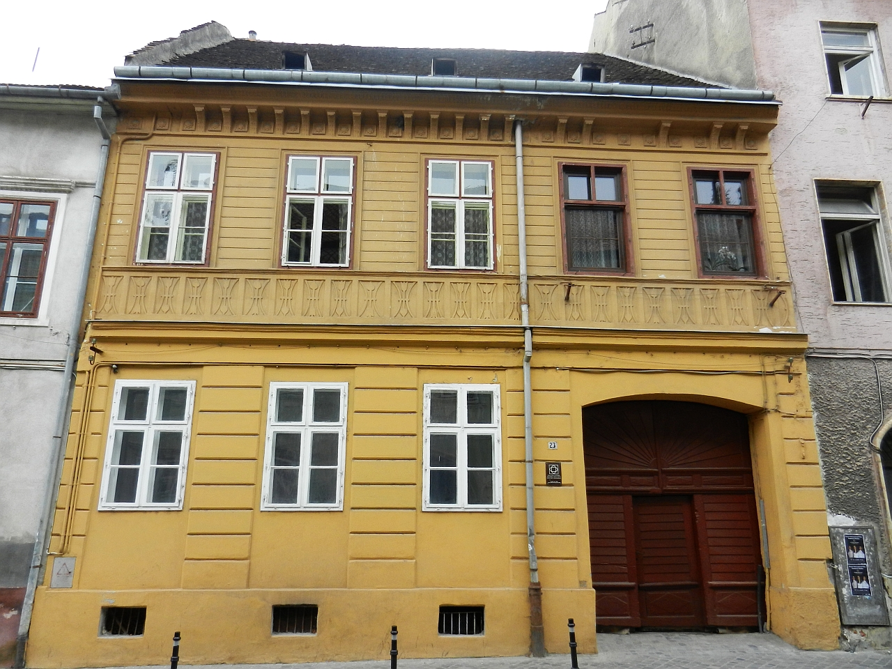 Casă monument istoric